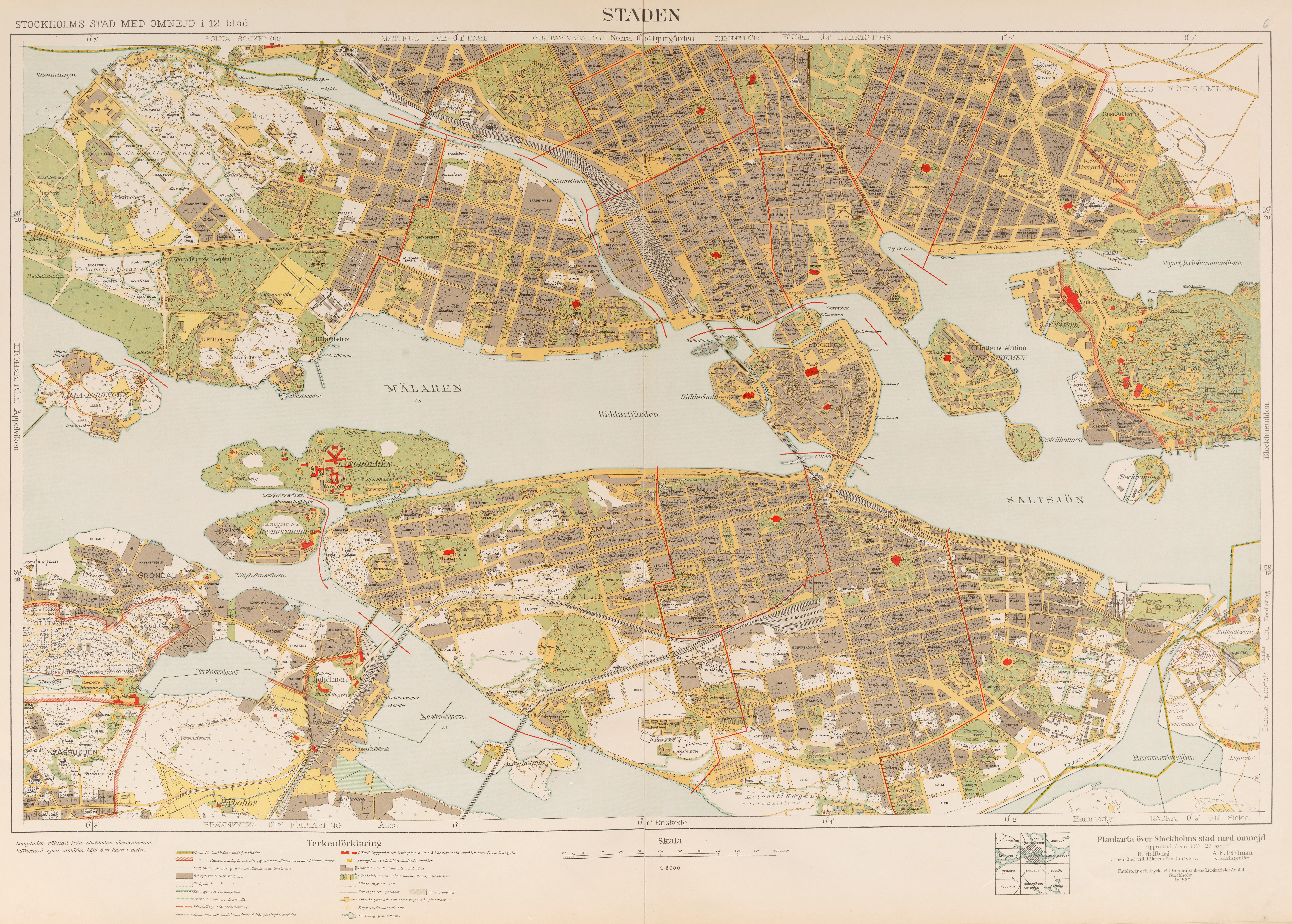 Karta "Stockholms stad med omnejd i 12 blad" 1917-1934. Här visas kartblad ”Staden”: innerstaden, Gröndal, Aspudden, Liljeholmen, Henriksdal